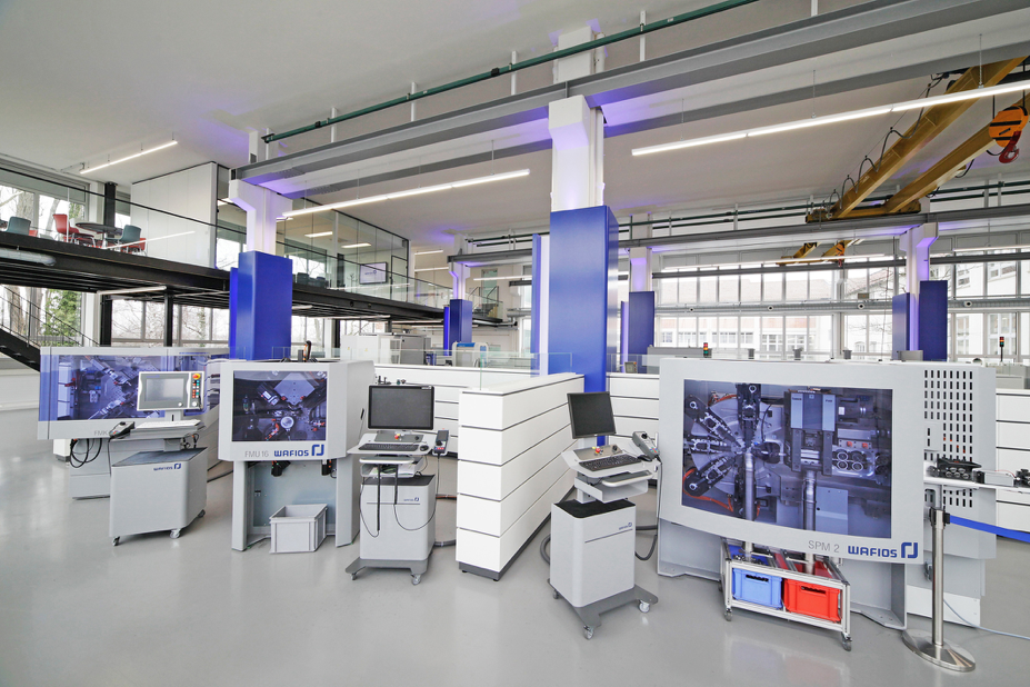 Wafios Showroom, Reutlingen, Deutschland